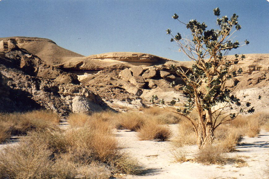 Landschaftsfoto vom Thumamah Nature Park, Saudi Arabien